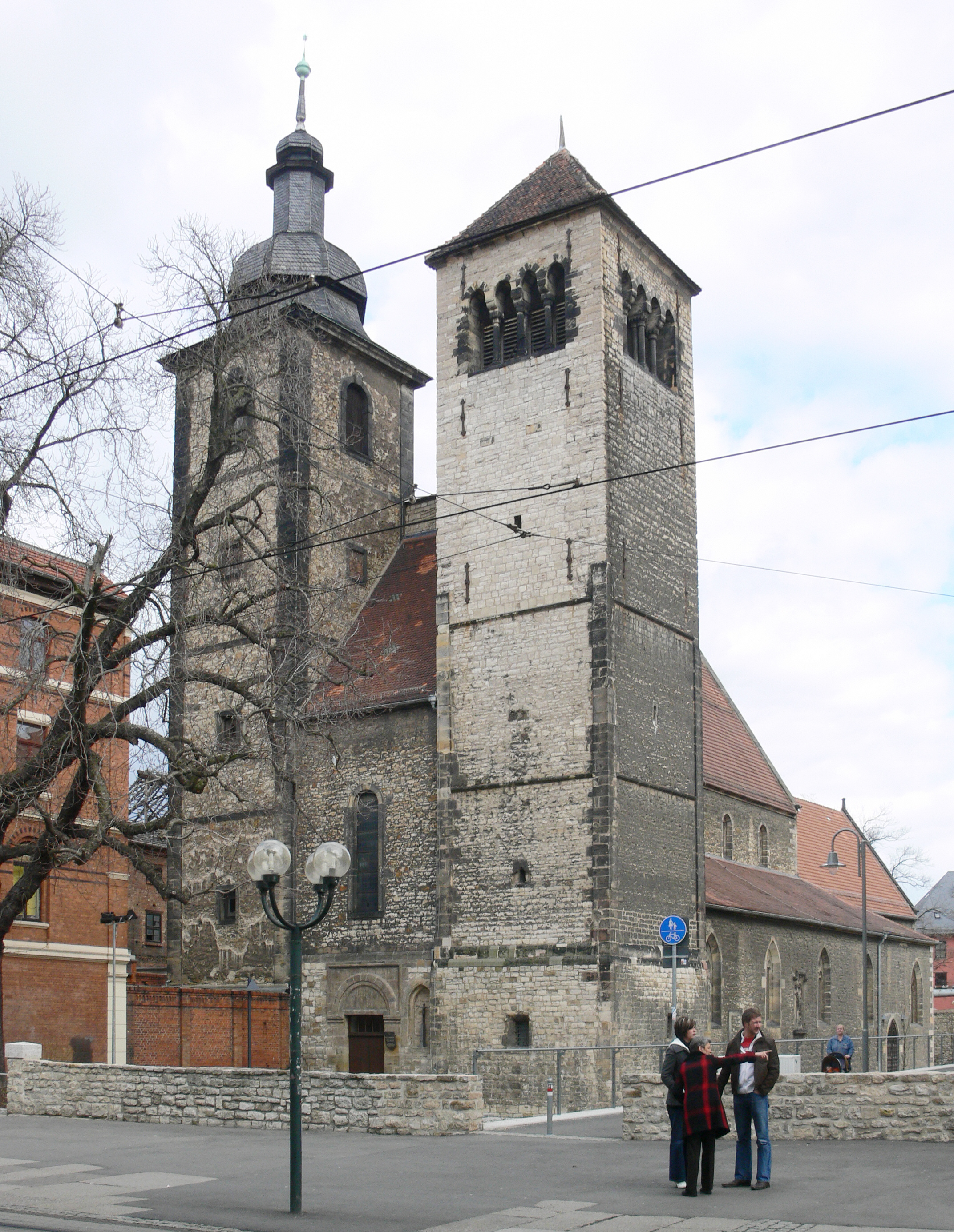 Reglerkirche Erfurt